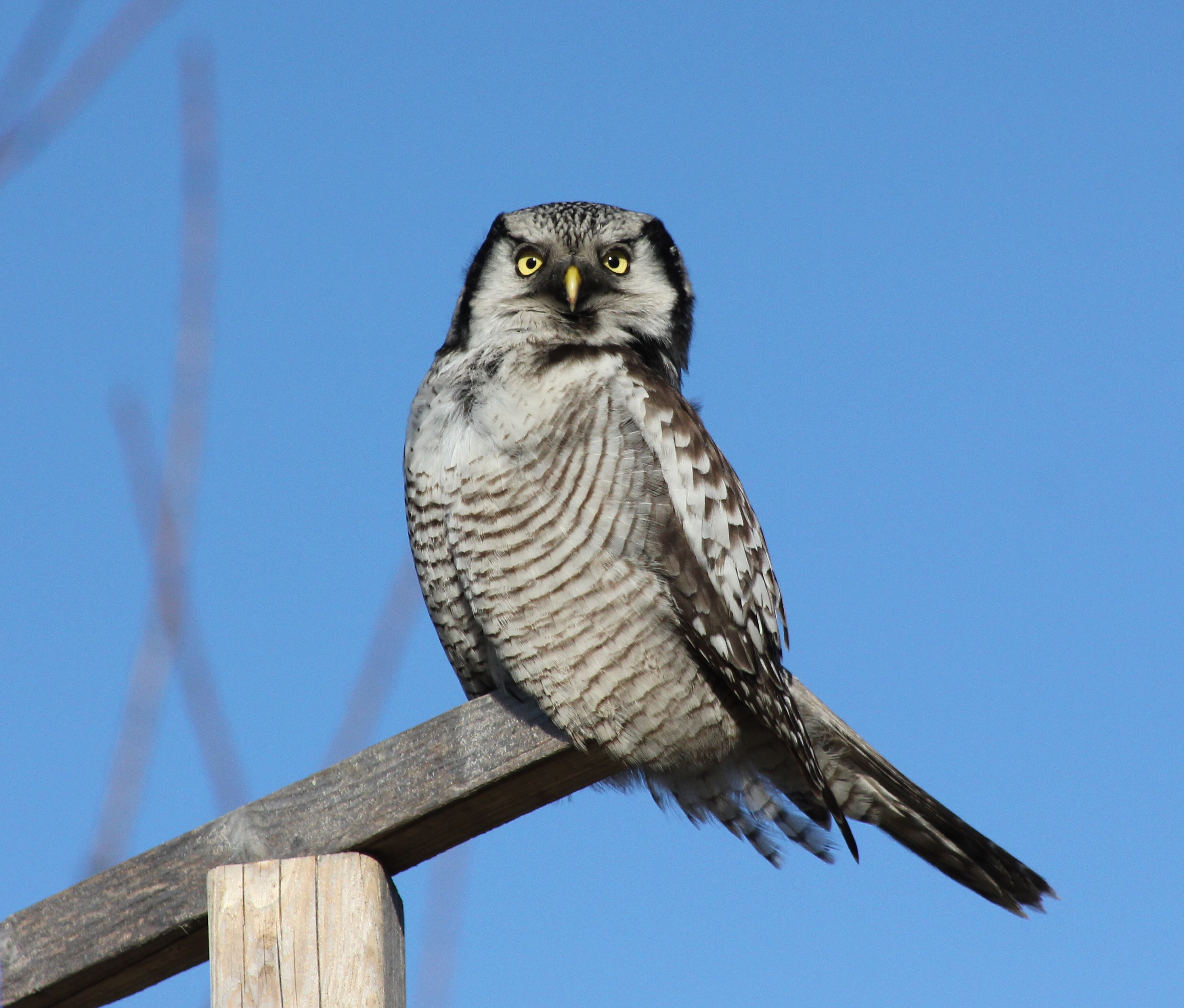 Sperbereule (Surnia ulula) in Deutschland. Gesehen wurde als seltener Gast in Stollberg; Erzgebirgskreis in Sachsen im Januar 2014.